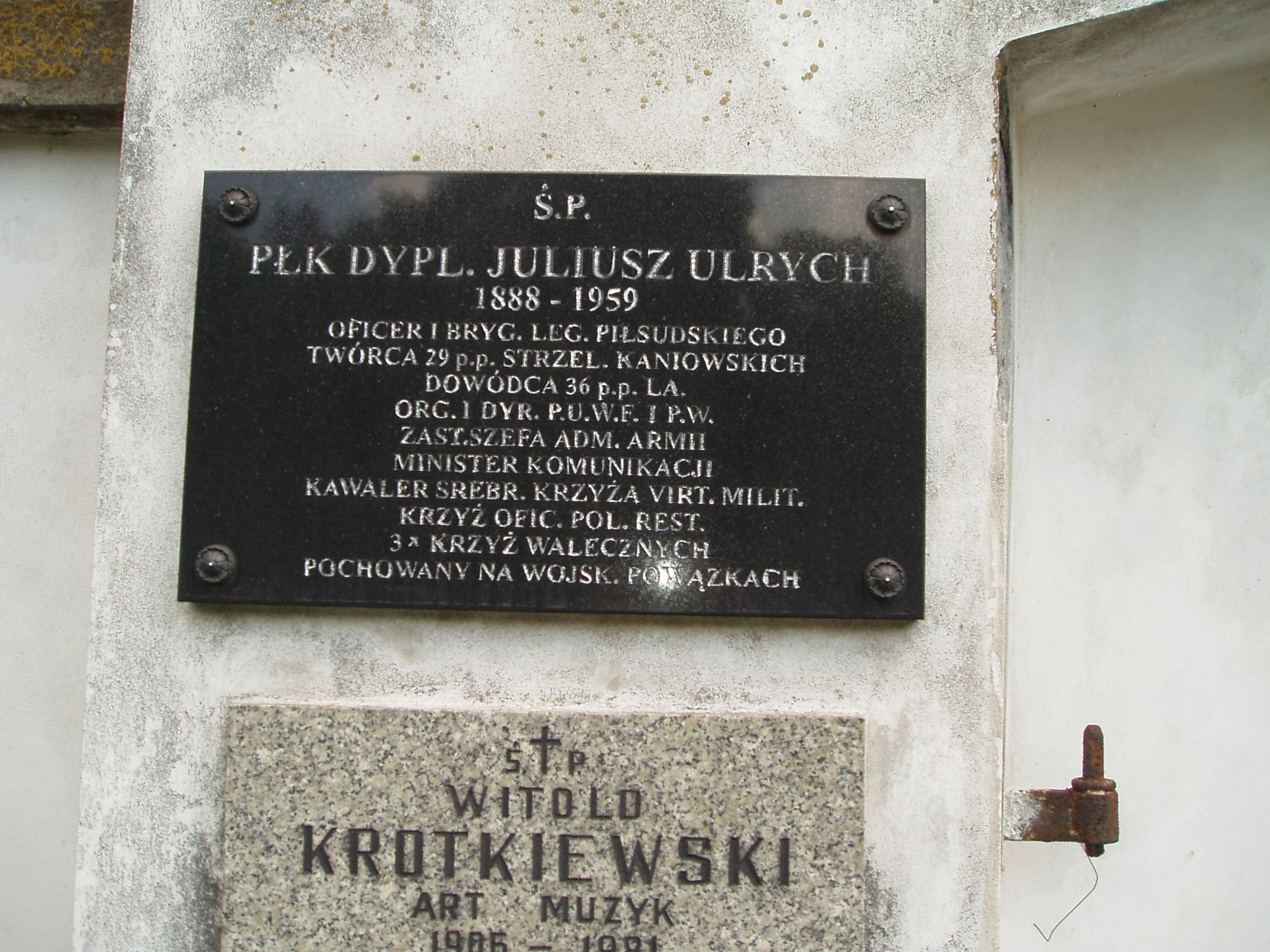 Juliusz Ulrych - tablica pamiątkowa na Cmentarz ewangelicko-augsburski w Warszawie